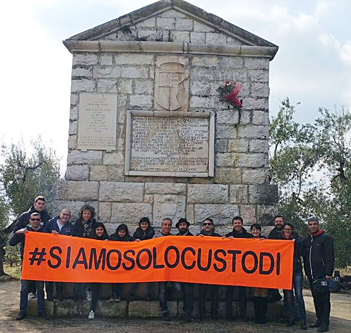 Epitaffio della Disfida di Barletta in agro di Trani. Volontari durante la consueta commemorazione del 13 febbraio.